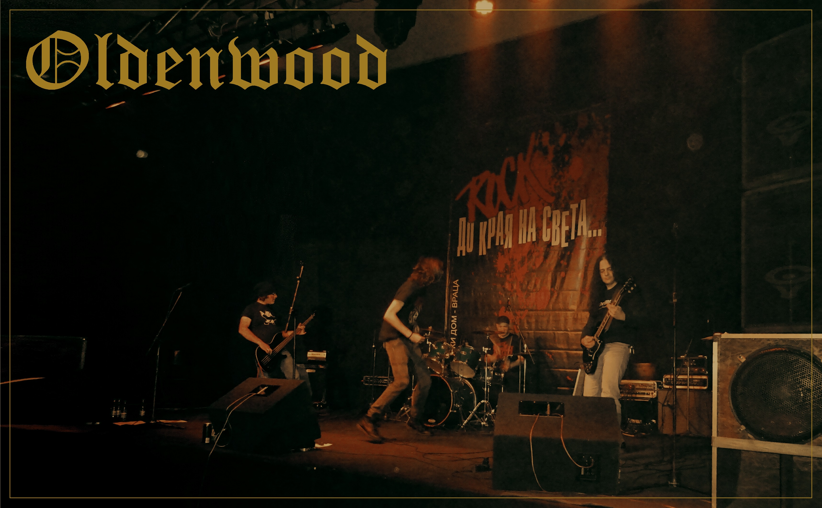 Oldenwood performing their gig at the "Youth Rock Festival" - Vratsa (15/December/2018)